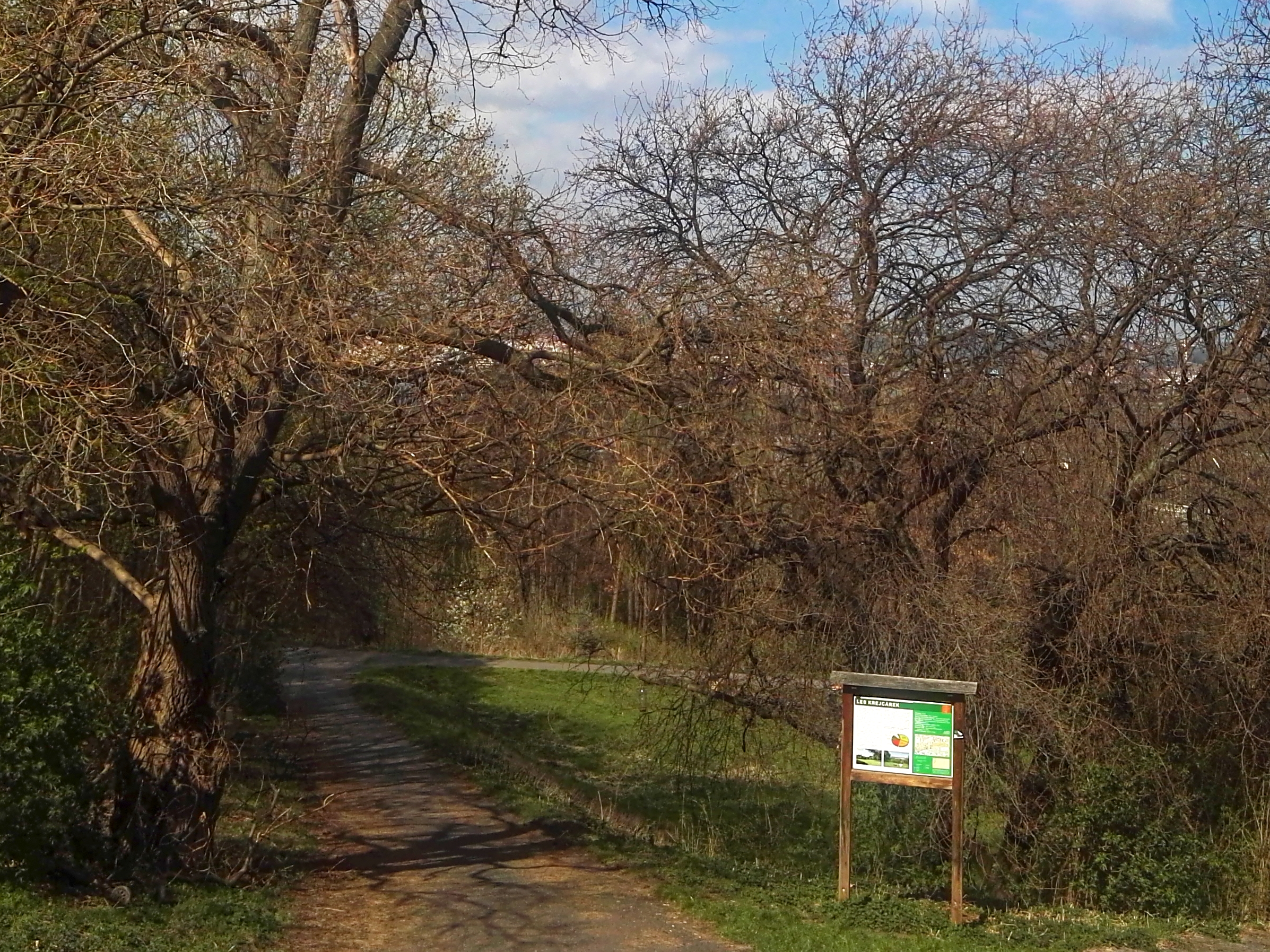 Les Krejcárek, informační tabule u západní části